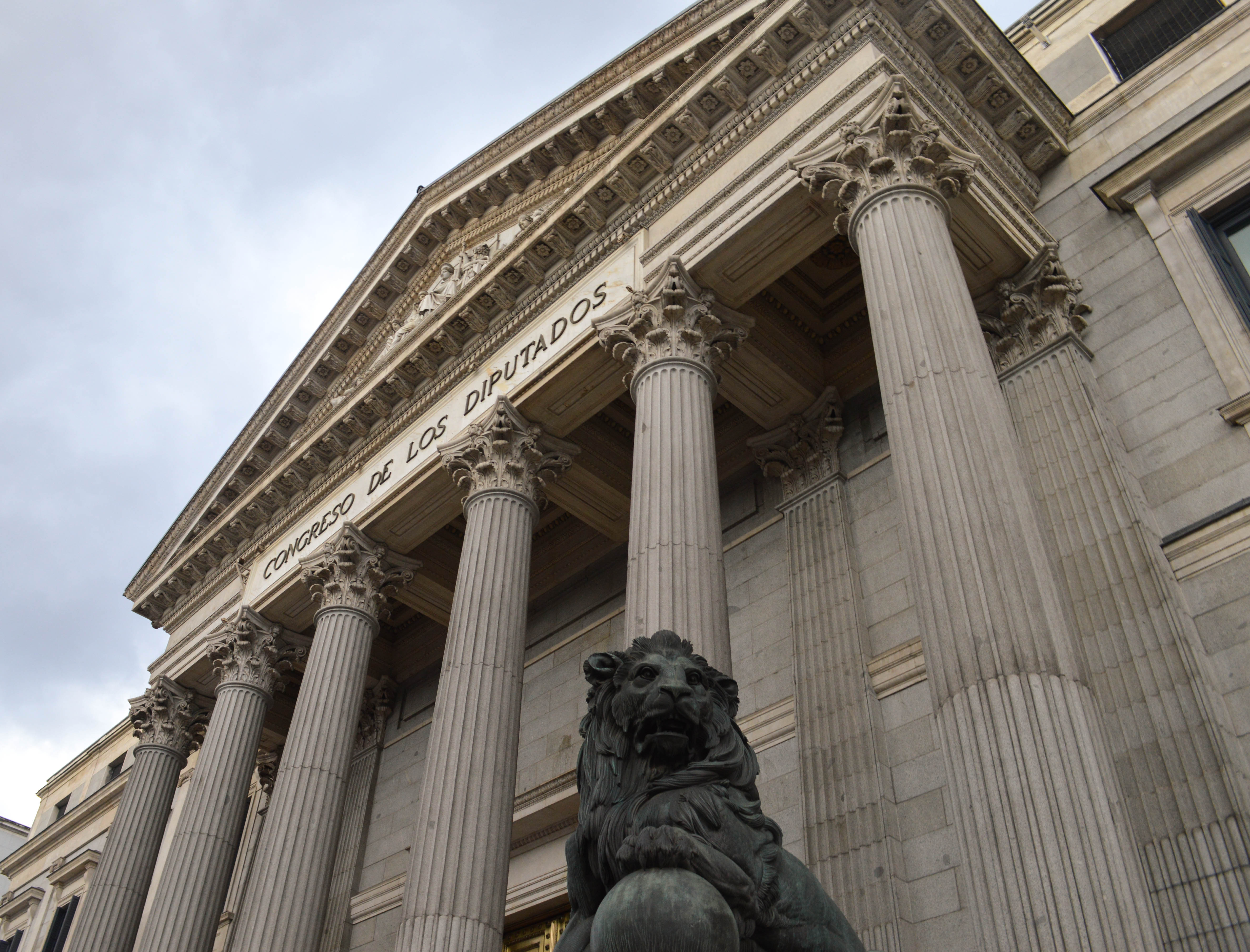 Palacio de los Diputados